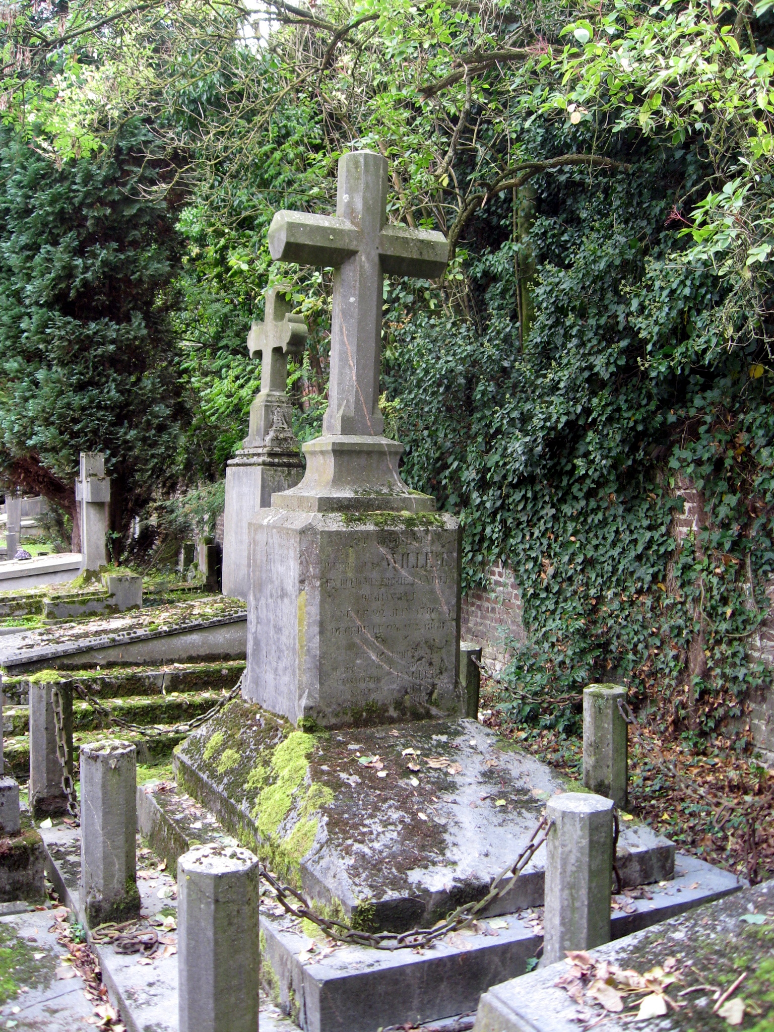 Graf van industrieel en burgemeester Pieter Jan Willems